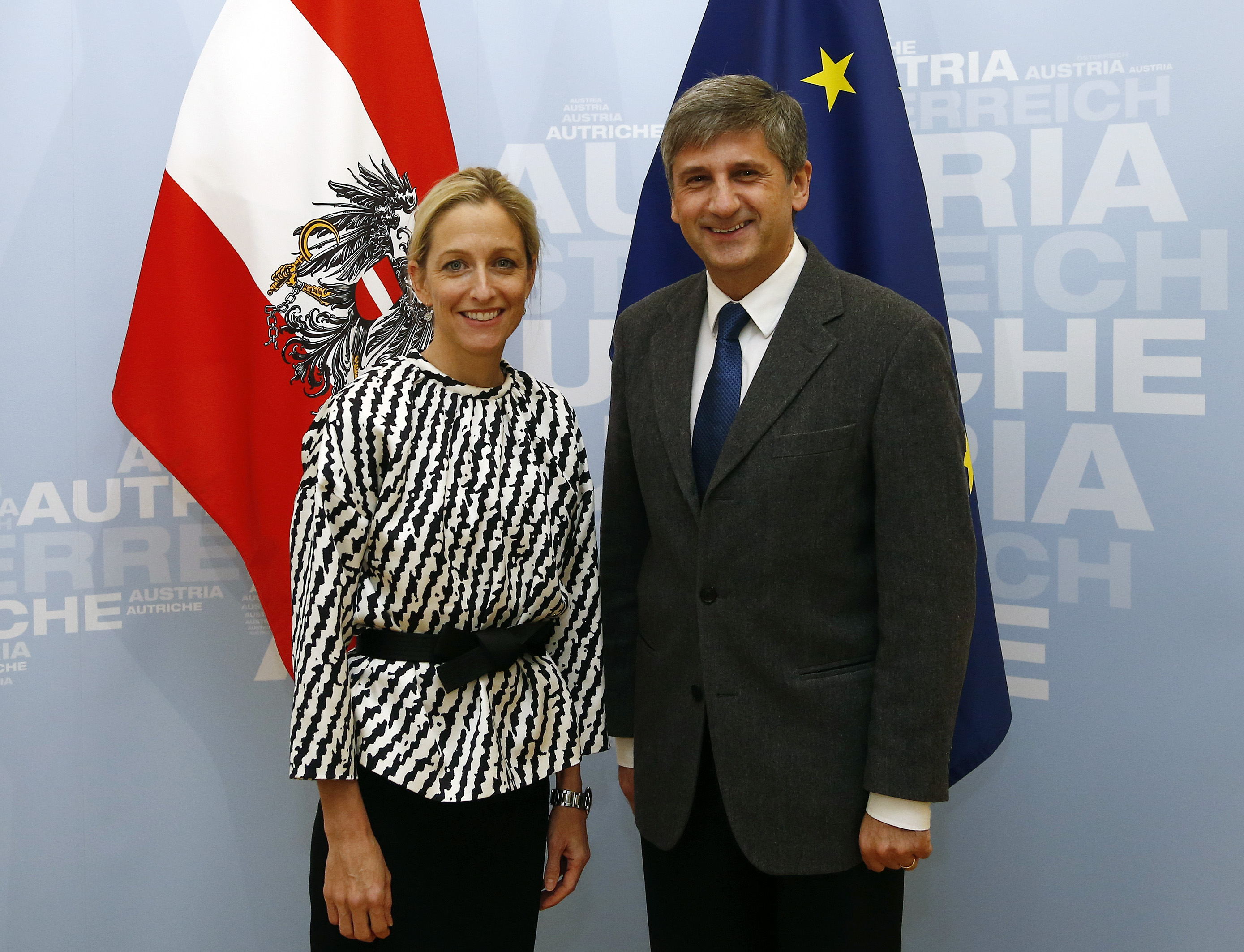 Vizekanzler und Außenminister Michael Spindelegger empfängt die Botschafterin der USA, Alexa Wesner, zu einem Gespräch. Wien, 26.11.2013, Foto: Dragan Tatic